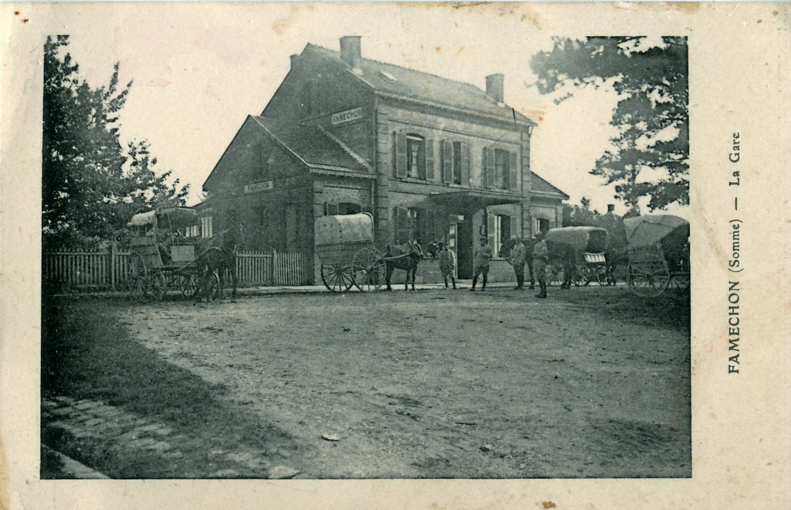 Carte postale ancienne éditée par Le Delay (ELD)Famechon (Somme) : la GareOn distingue sur le cliché des soldats en uniforme et leurs charriots : guerre 1914-1918